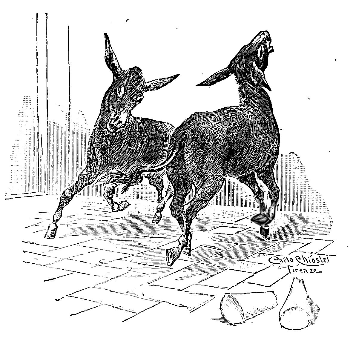 Illustrations from "Le avventure di Pinocchio, storia di un burattino", Carlo Collodi, Bemporad & figlio, Firenze 1902 (Drawings and engravings by Carlo Chiostri, and A. Bongini)